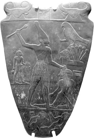 In tweeën gedeeld om meer details te laten zien.